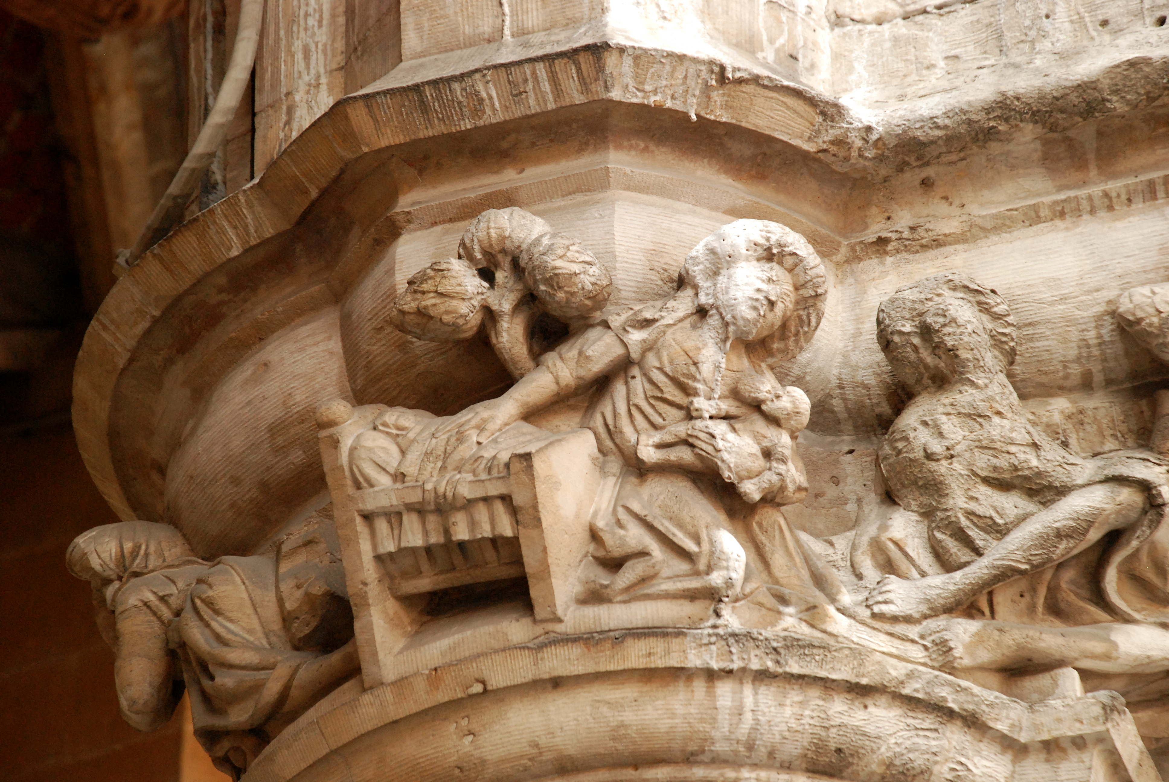 Belgique - Bruxelles - Grand-Place - Maison du Maure